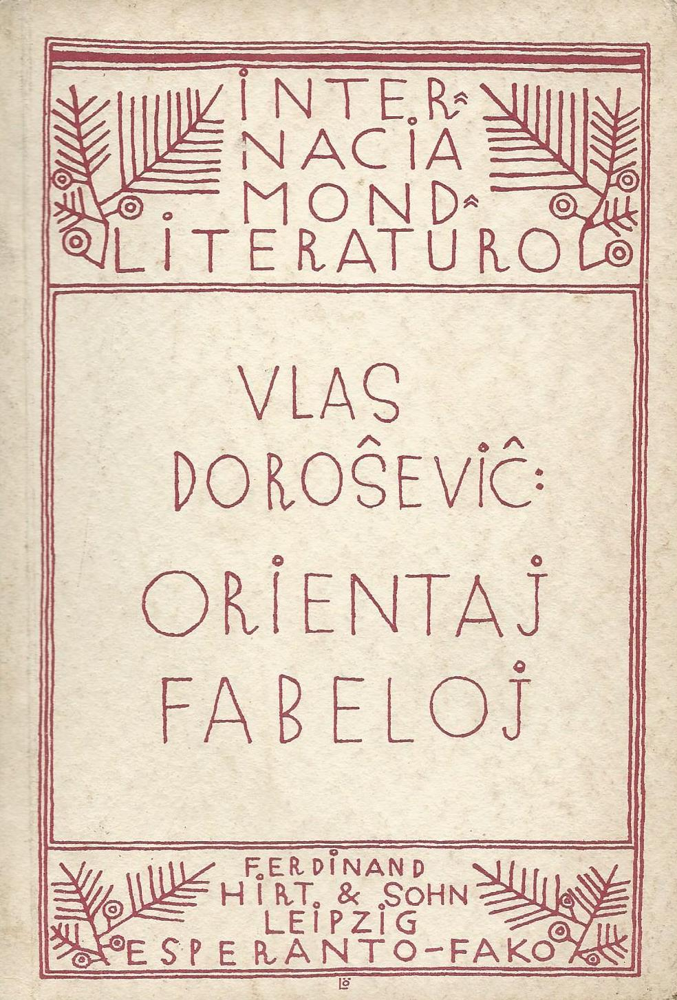 kovrilo de "Orientaj Fabeloj", 1924